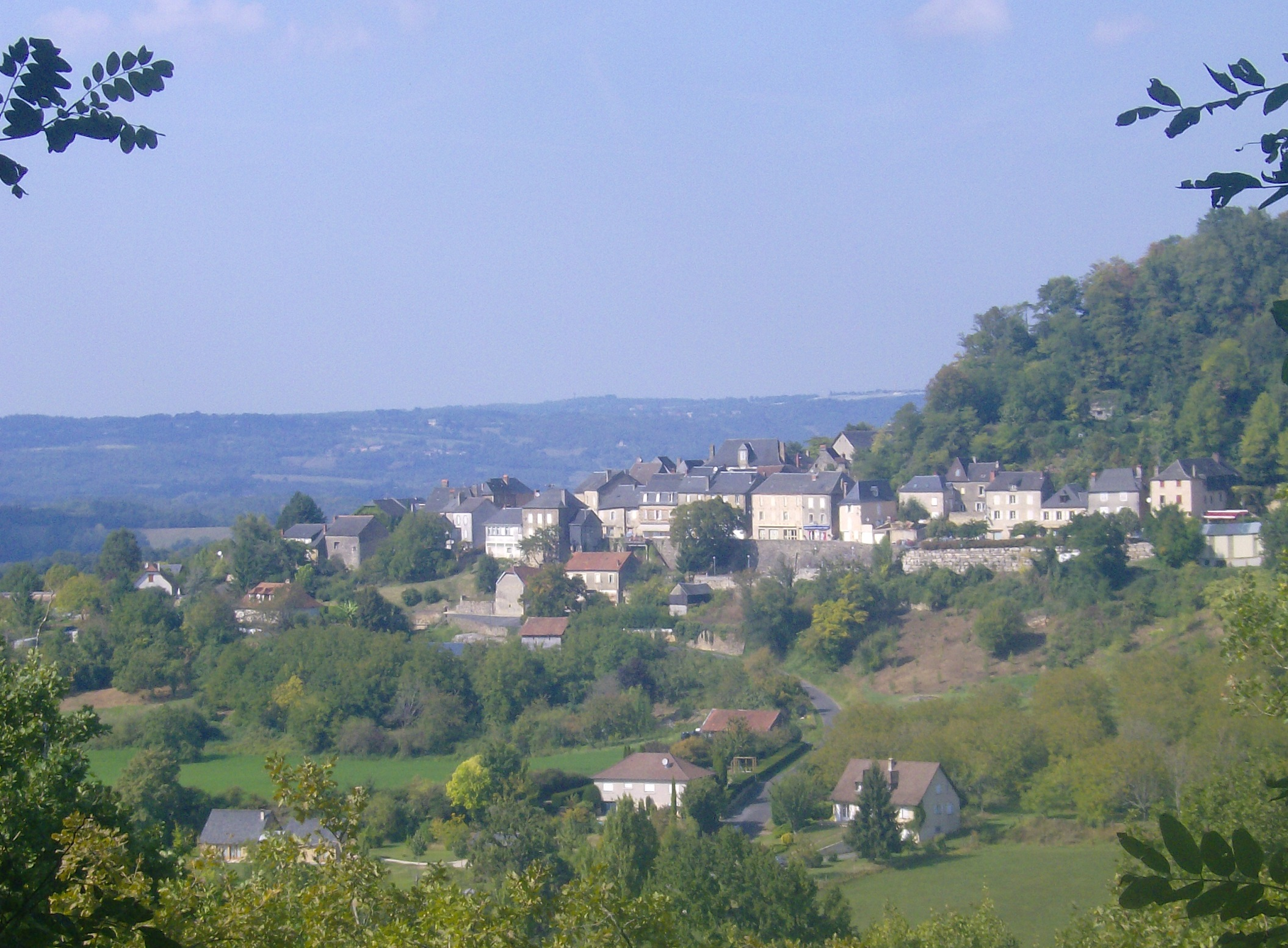 Ayen vu de la route menant au hameau du Temple